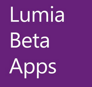 Logo do Microsoft Lumia Beta